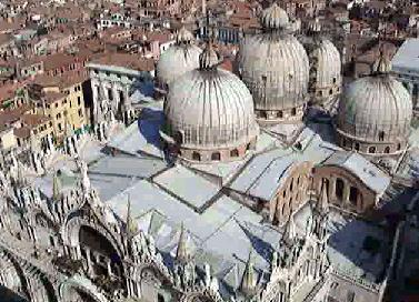 Cobertura da Basílica de São Marcos, em Veneza.